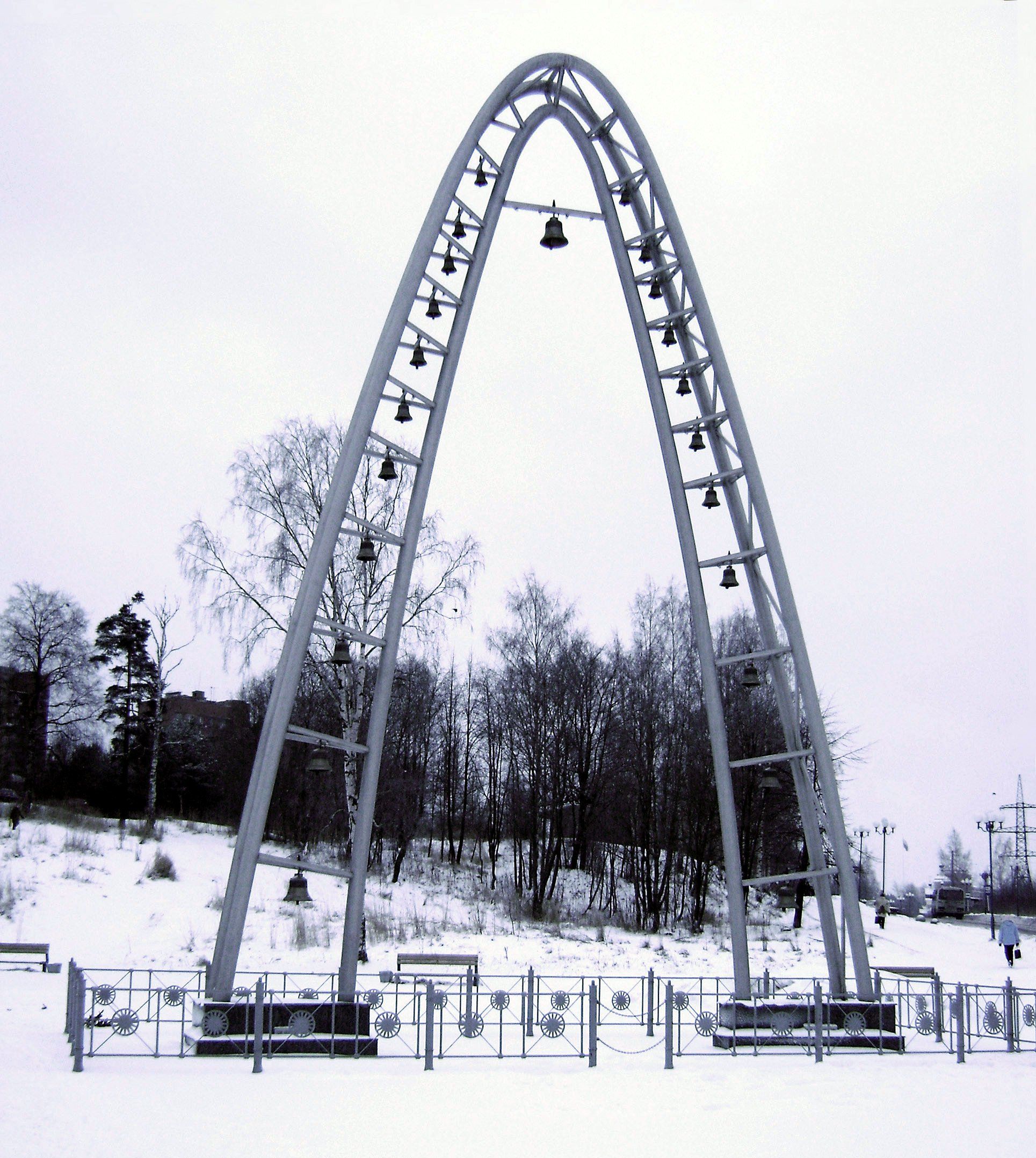 14-метровый карильон на 23 колокола на площади напротив Ледового дворца в Кондопоге